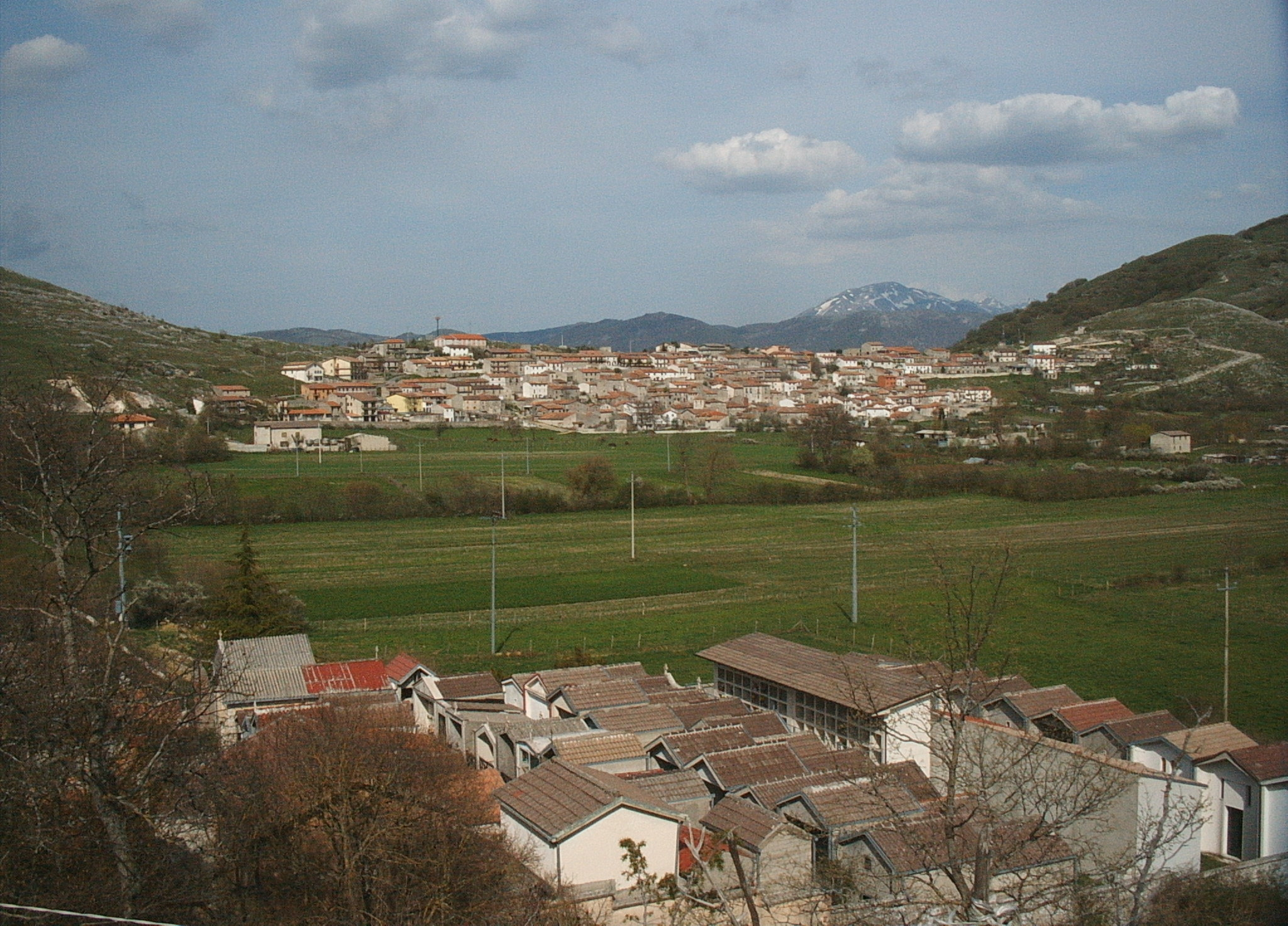 Termine di Cagnano Amiterno (provincia dell'Aquila). Foto di Vinc81. aprile 2006